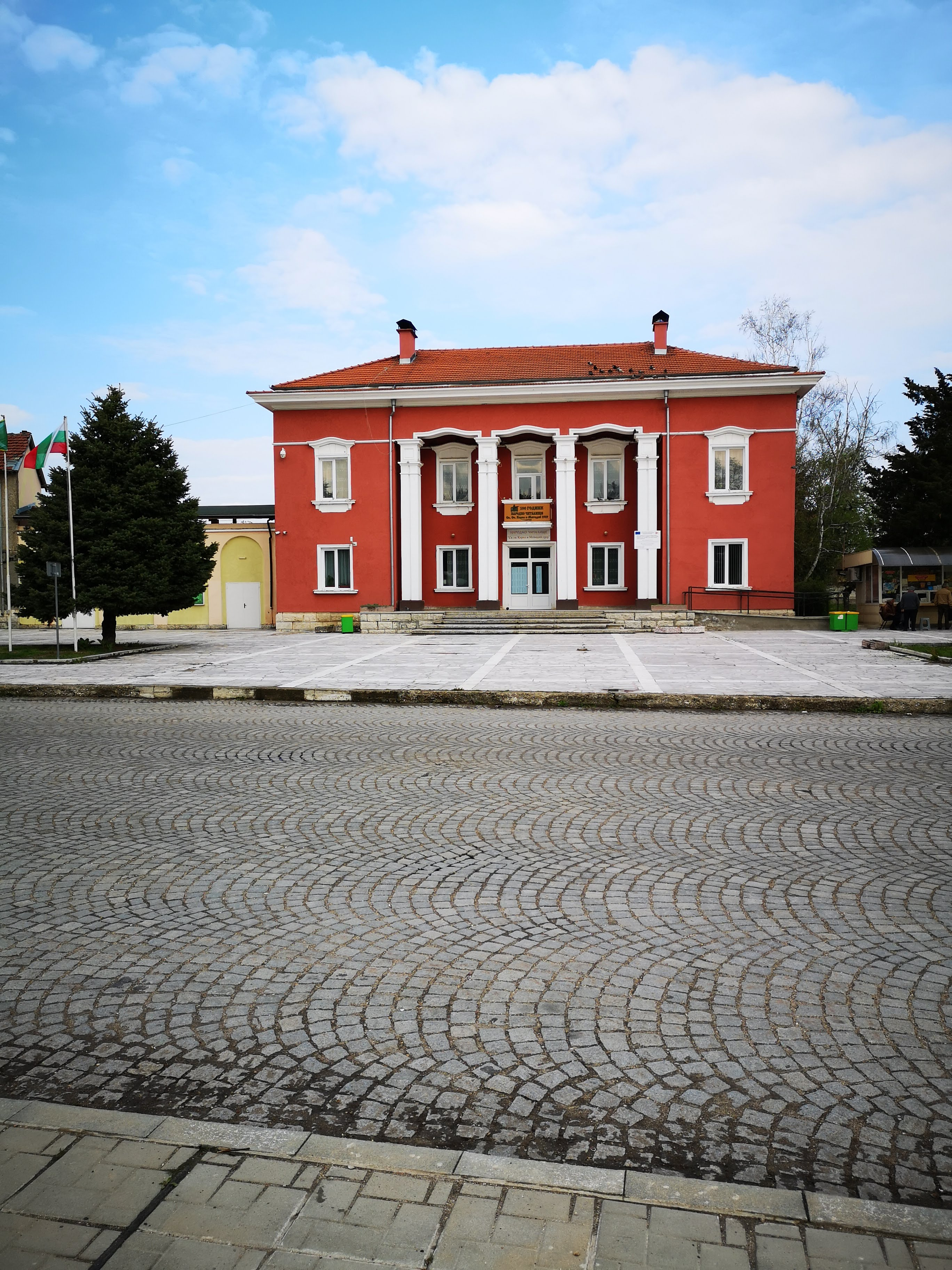 Centro de la vida cultural de la ciudad.